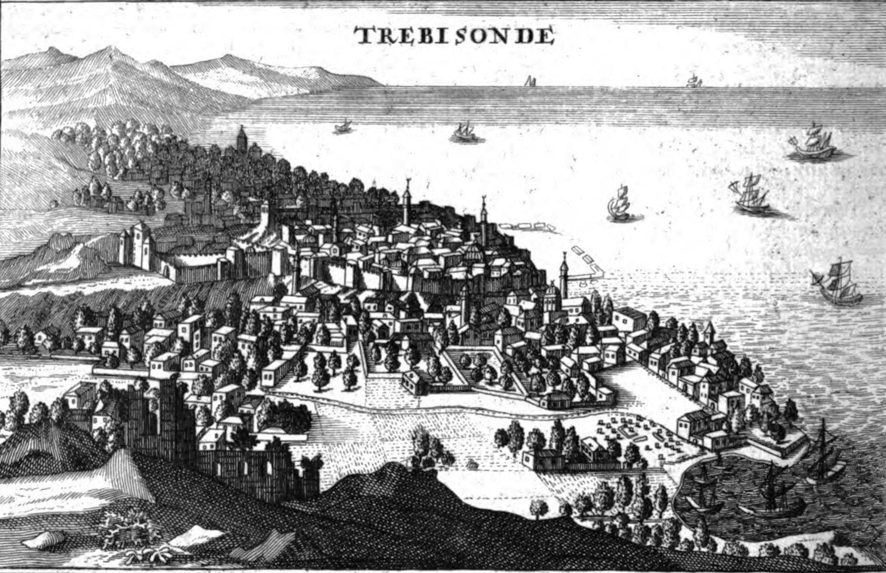 Relation d'un voyage du Levant: fait par ordre du Roi : contenant l'histoire ancienne & moderne de plusieurs isles de l'Archipel, de Constantinople, des Côtes de la Mer Noire, de l'Armenie, de la Georgie, des frontières de Perse & de l'Asie Mineure.